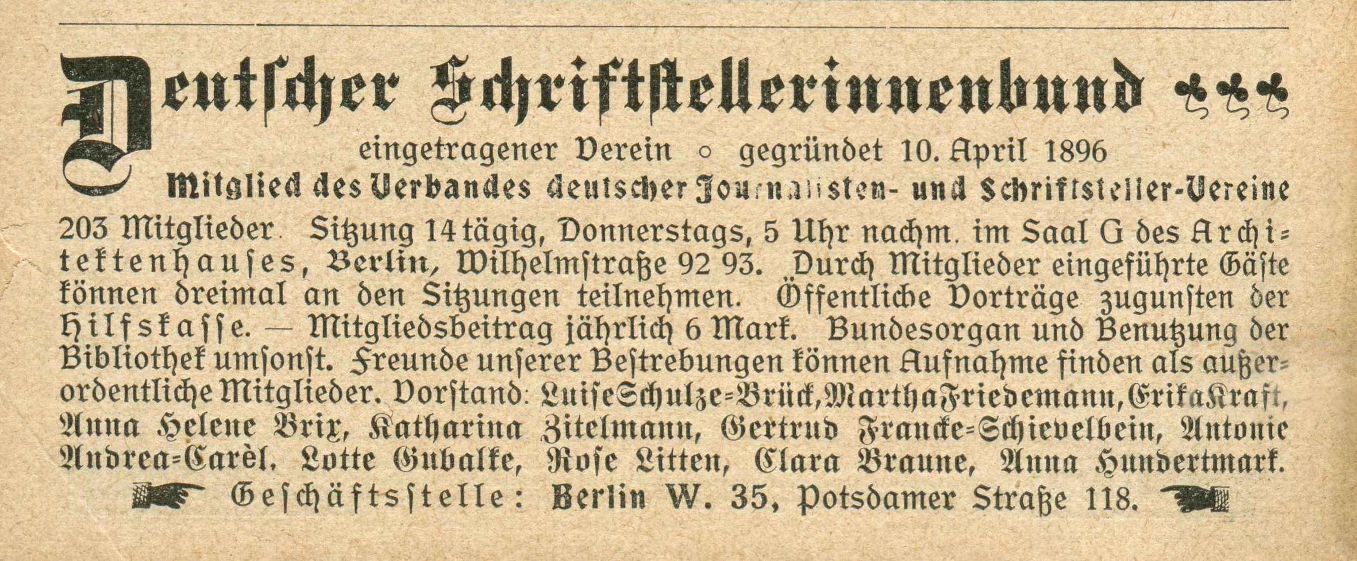 Anzeige des Schriftstellerinnen-Verbandes von 1896 in Berlin